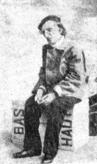 Leopoldo Fregoli disfrazado como uno de sus personajes hacia 1935 en la revista Caras y Caretas.